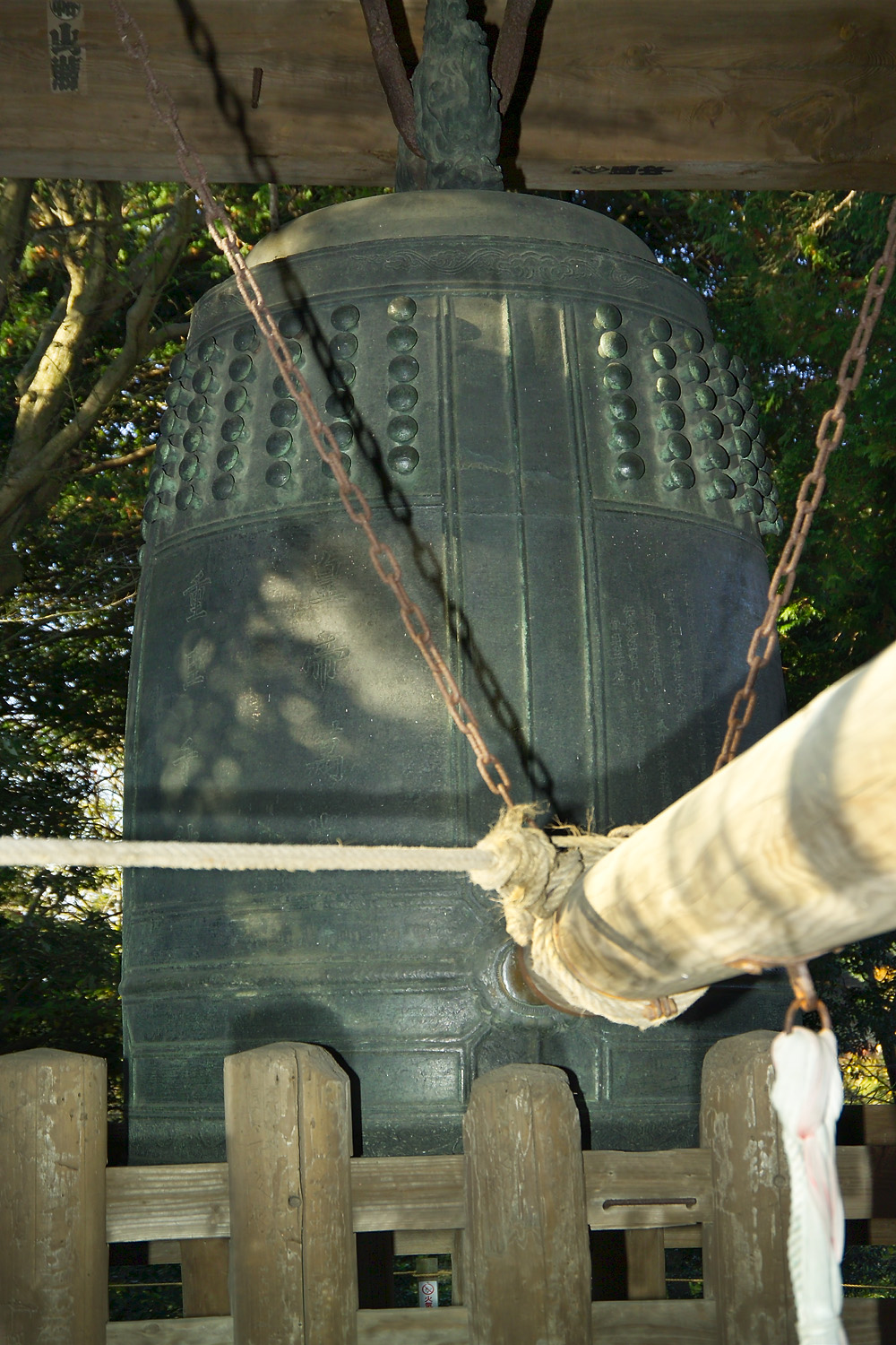 Great bell at Engaku-ji in Kamakura, Japan 鎌倉円覚寺の梵鐘（国宝）